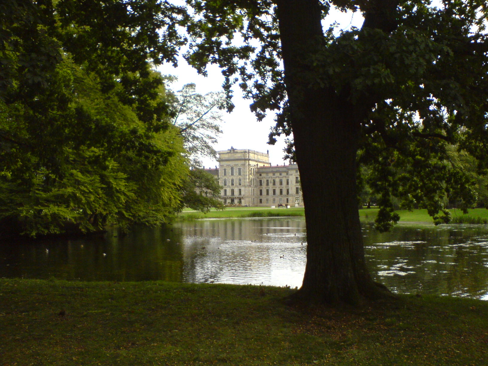 Schloss Ludwigslust, Park